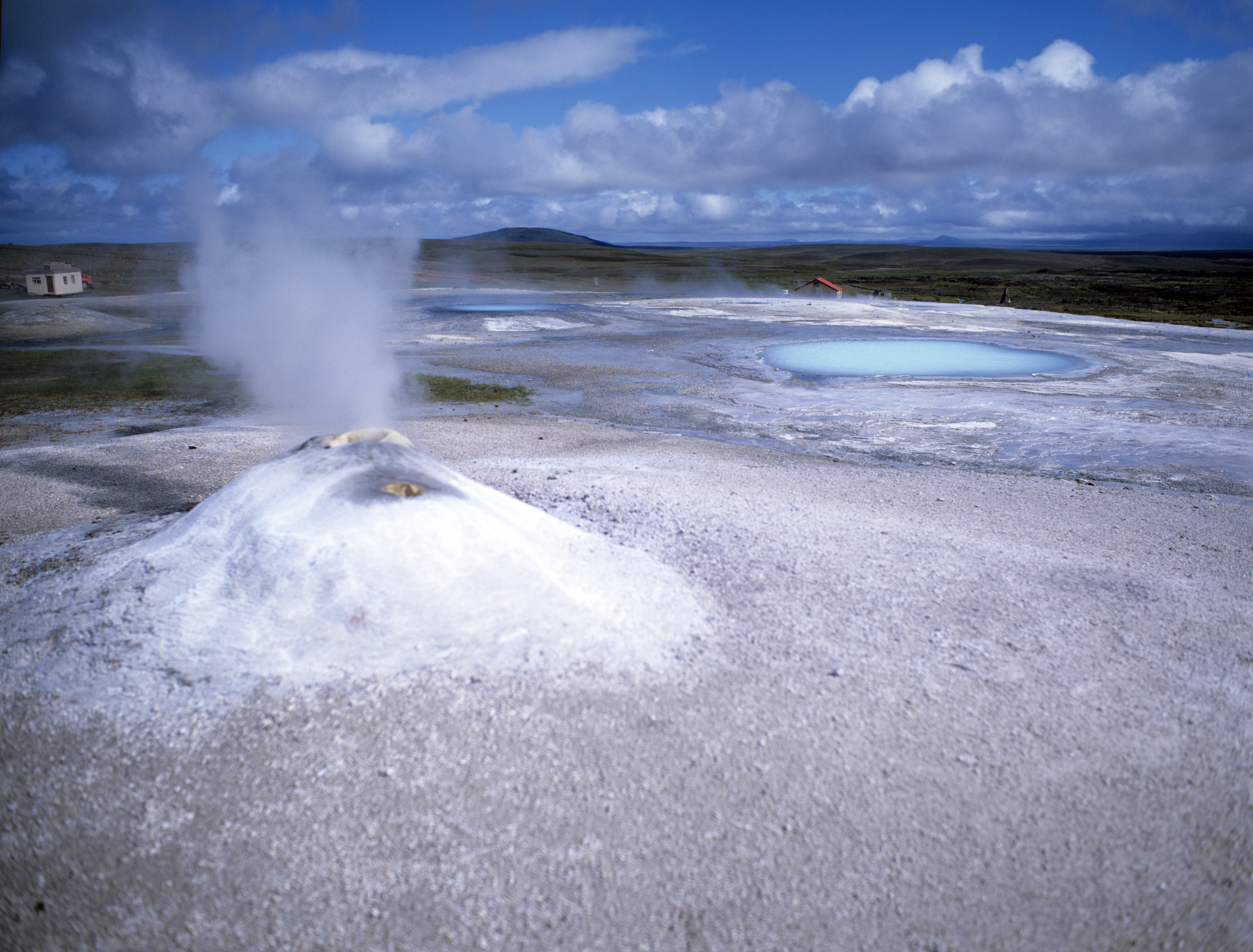 Hveravellir